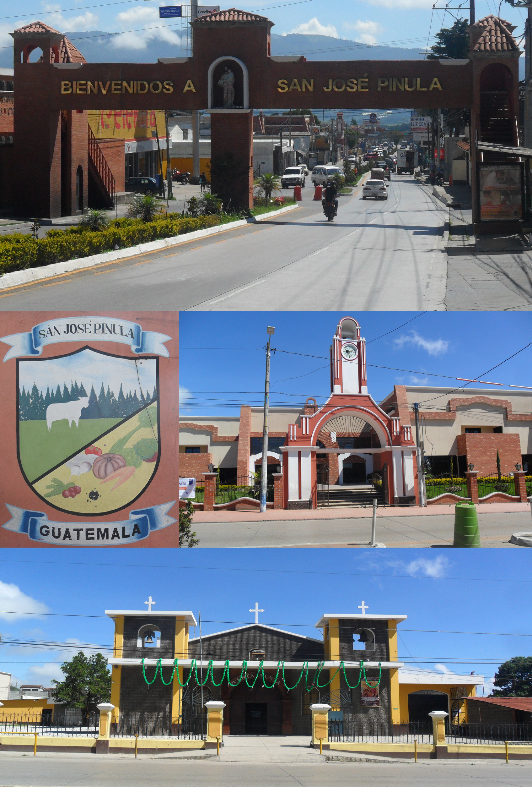 Composición de imágenes para cabecera